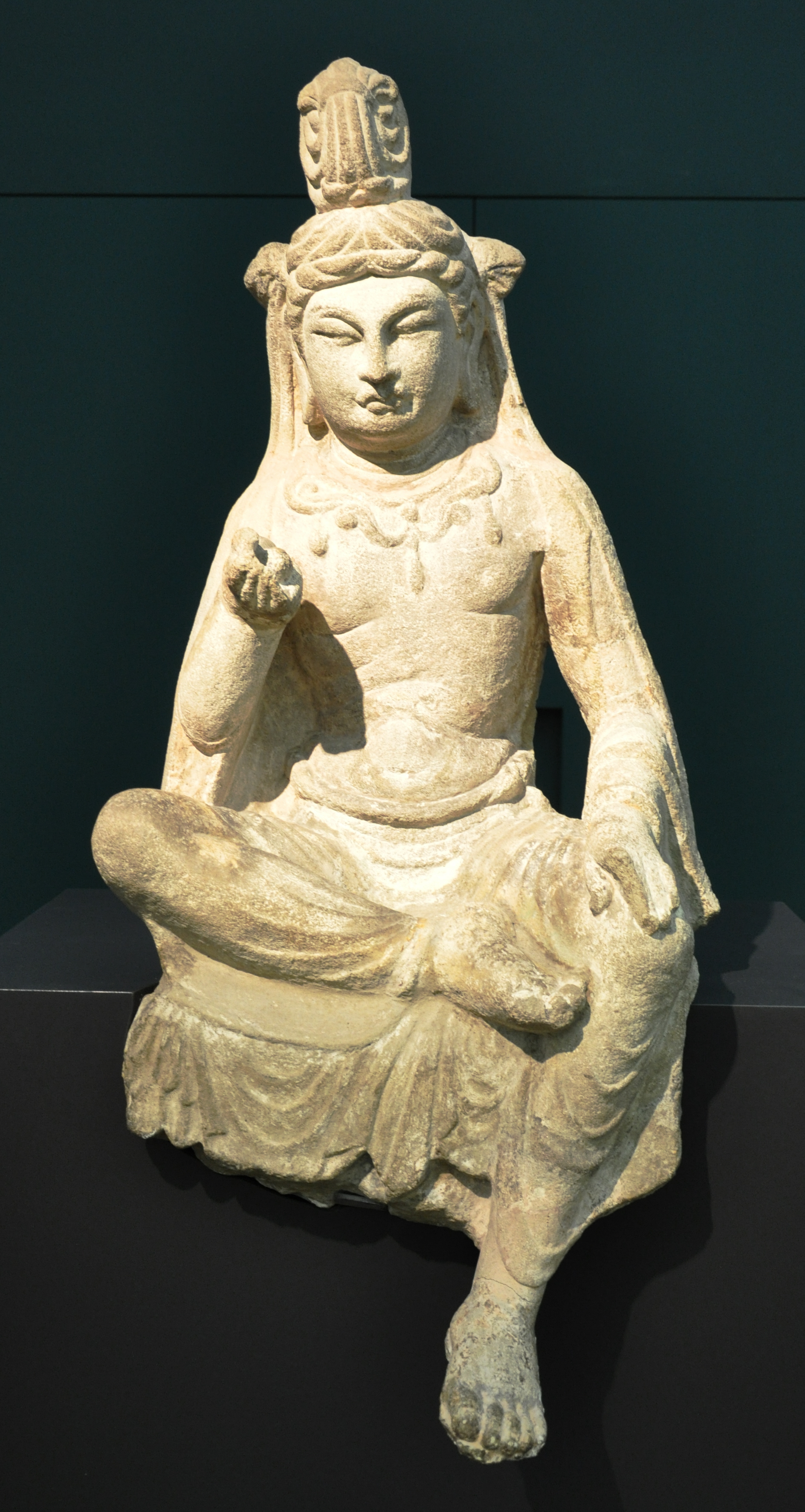 Sitzender Bodhisattva, China, Provinz Shanxi, aus Höhle 17 der Höhlentempel von Tianlongshan, Tang-Dynastie, Mitte 8. Jahrhundert; Sandstein Museum Rietberg, Zürich; Geschenk Eduard von der Heydt; Inv. Nr. RCH 148 (?)